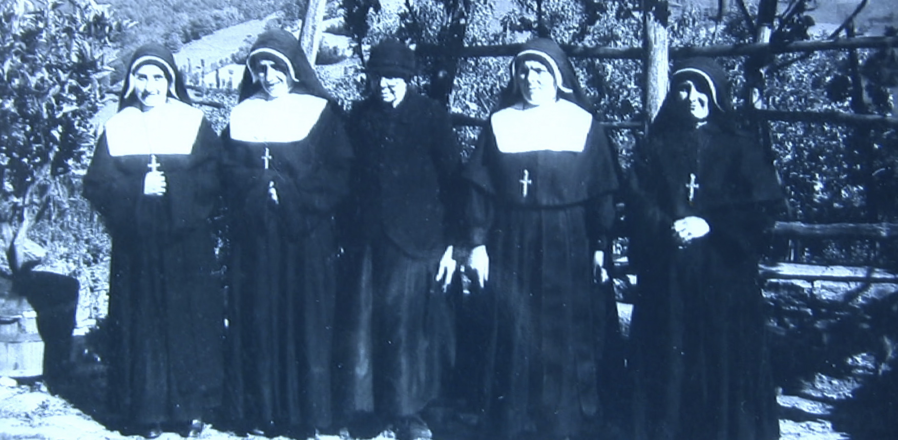 Religieuses du couvent de l'union en 1940. De gauche à droite: soeur Marie-Odile, soeur Marie-Antoinette, Melle Labaume institutrice, soeur Marie-Hélène, soeur Brigitte. (Pomayrols, Aveyron, France). Fondé le 12 février 1675 le couvent de l'union de Pomayrols a été placé sous la protection de Saint François de Sales. Les soeurs de l'union (autrefois soeurs du travail) sont liées par les trois voeux de pauvreté, de chasteté, et d'obéissance. En plus du travail manuel, elles ont en charge l'éducation des enfants qu'elles initient aux valeurs du christianisme. C'est également une congrégation enseignante, la scolarité des enfants est assurée par des enseignants religieux ou laîcs. En septembre 1975 par manque d'écoliers le couvent ferma ses portes, les religieuses réintégrèrent le couvent de l'union de Saint Geniez d'Olt.